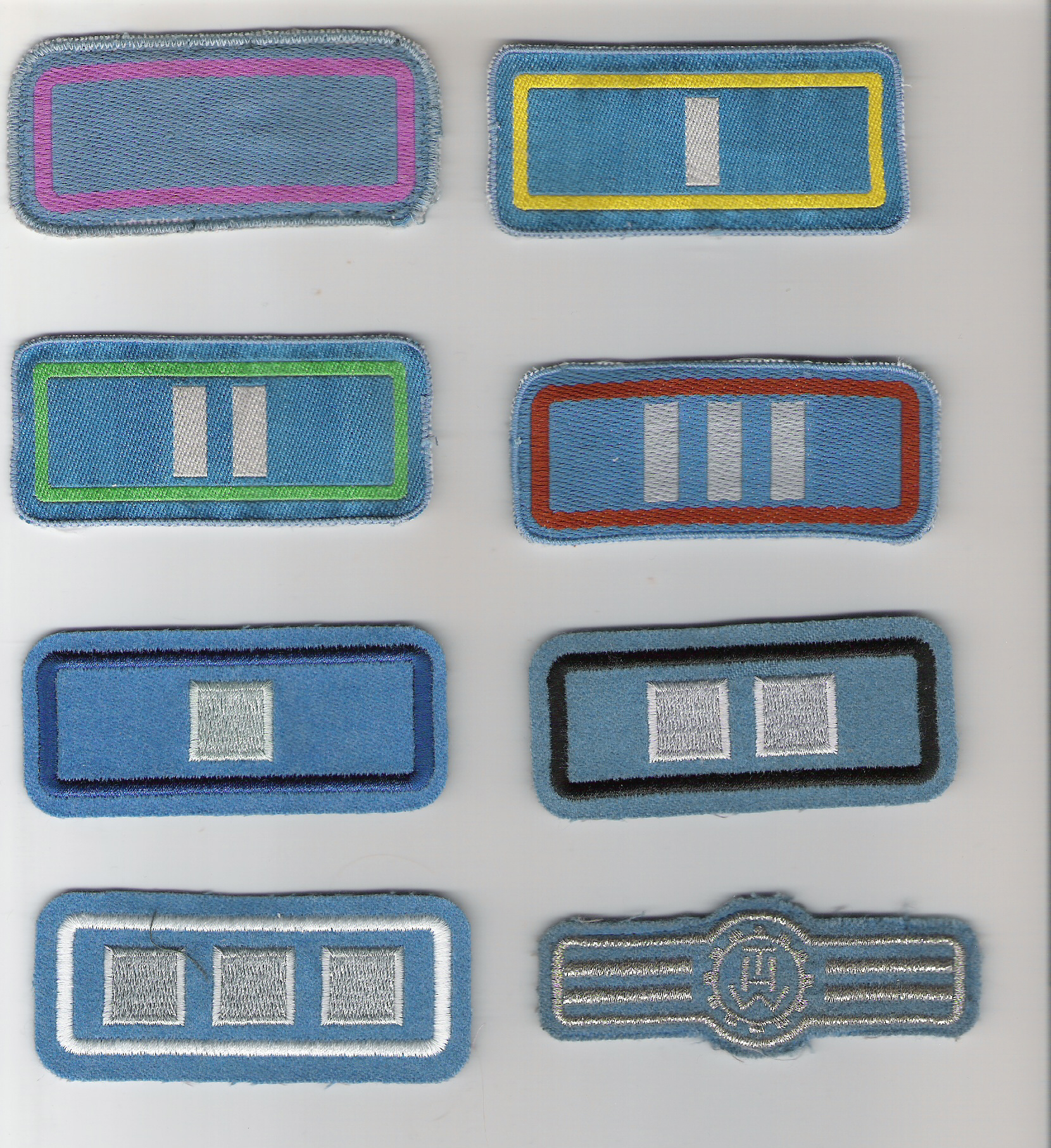 Dienststellungskennzeichen des THW bis 1994 in gewebter und gestickter Ausfüherung für den Einsatz- bzw. Dienstanzug Von oben links nach unten rechts:Helfer Verbrauchsgüter-/Materialerhaltungs-/Verpflegungstrupp, Truppführer Fermeldedienst, Gruppenführer Instandsetzungsdienst, Zugtruppführer ABC-Dienst, Zugführer ohne Fachdienst, Stellv. Bereitschaftsführer Bergungsdienst, Bereitschaftsführer TEL, Ortsbeauftragter (Obere 4 in Ausführung für Einsatzbekleidung, Untere 4 in Ausführung für den Dienstanzug